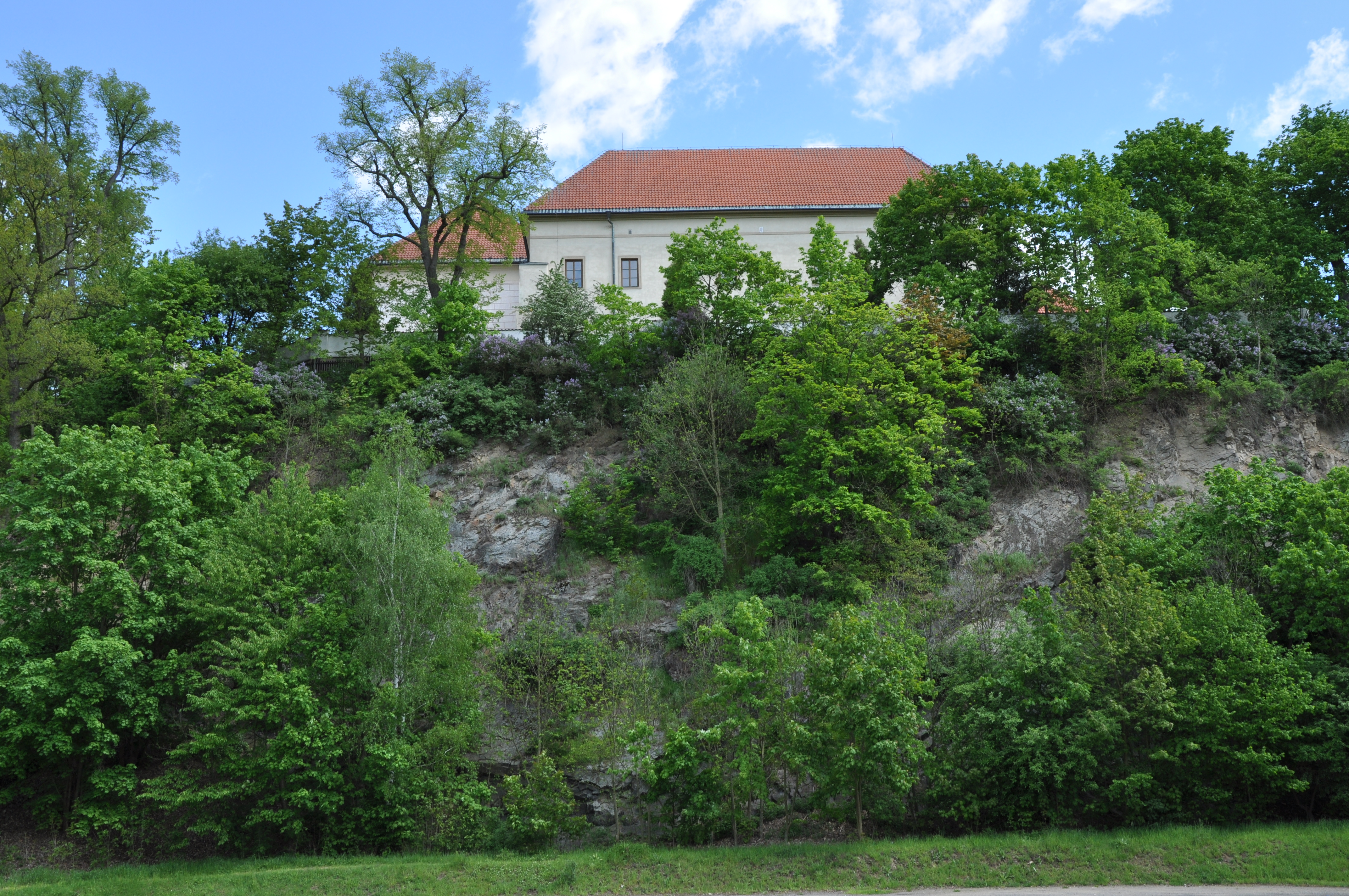 Přibyslavský zámek byl vybudován Zachariášem z Hradce v roce 1560 na místě bývalého hospodářského dvora, jenž patřil k přibyslavskému hradu a byl vypálen při dobývání města v roce 1424. Zadní, starší část zámku je postavena ve stylu italské renesance. V objektu se nyní nachází Hasičské muzeum a Centrum hasičského hnutí. Město Přibyslav. Okr. Havlíčkův Brod. Kraj Vysočina. Czech Republik.